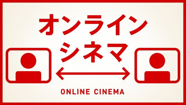 ONLINE CINEMA 番組ロゴ